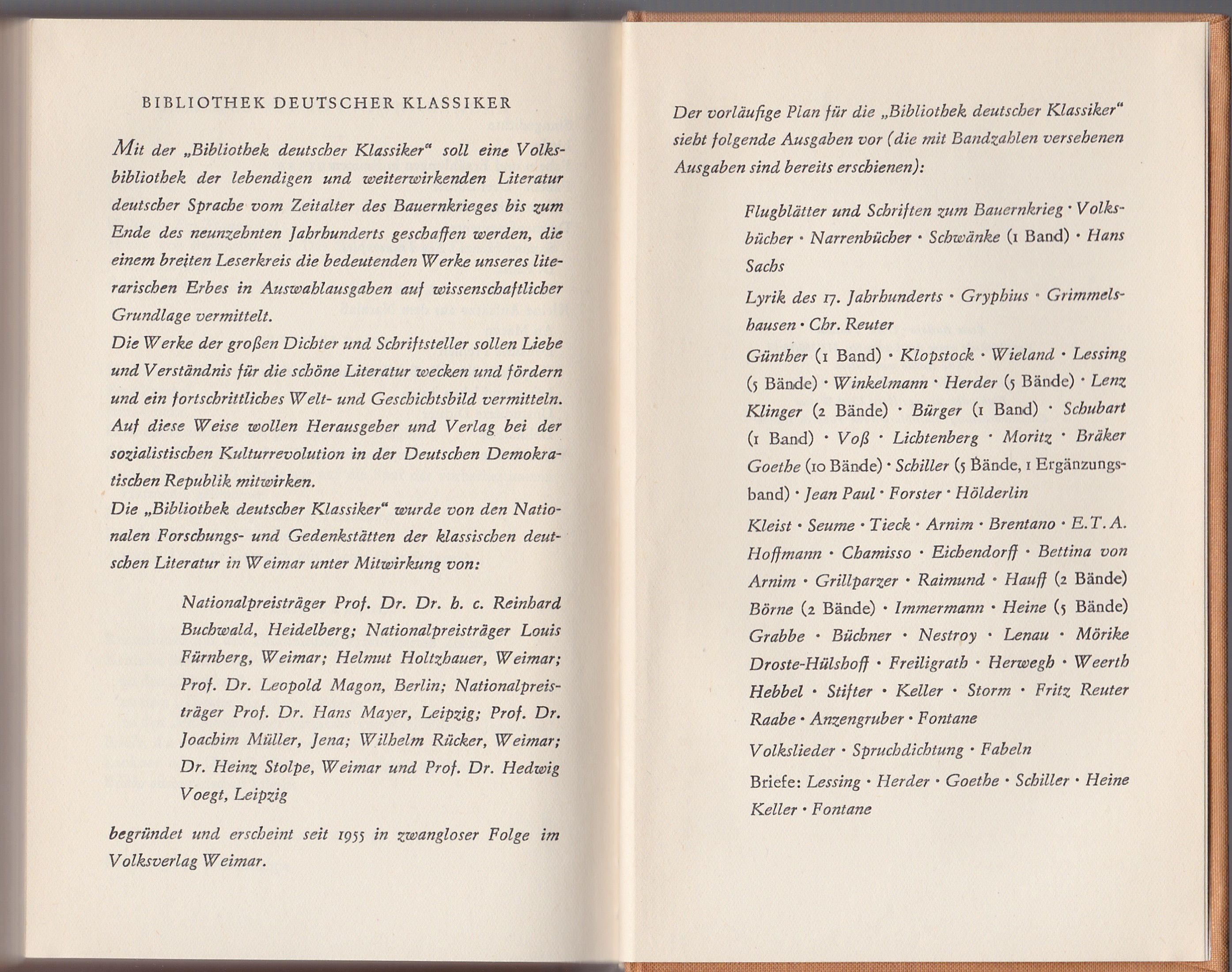 Selbstbeschreibung der Reihe und vorläufiger Plan der Ausgaben. In Lessings Werke in fünf Bänden, Volksverlag Weimar 1959.